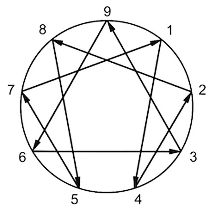 Grafische weergave van het Enneagram, met de pijlen van het dynamisch model